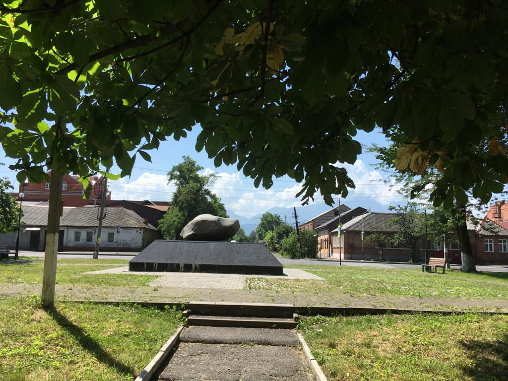 Памятник жертвам политических репрессий "Камень слёз", Владикавказ